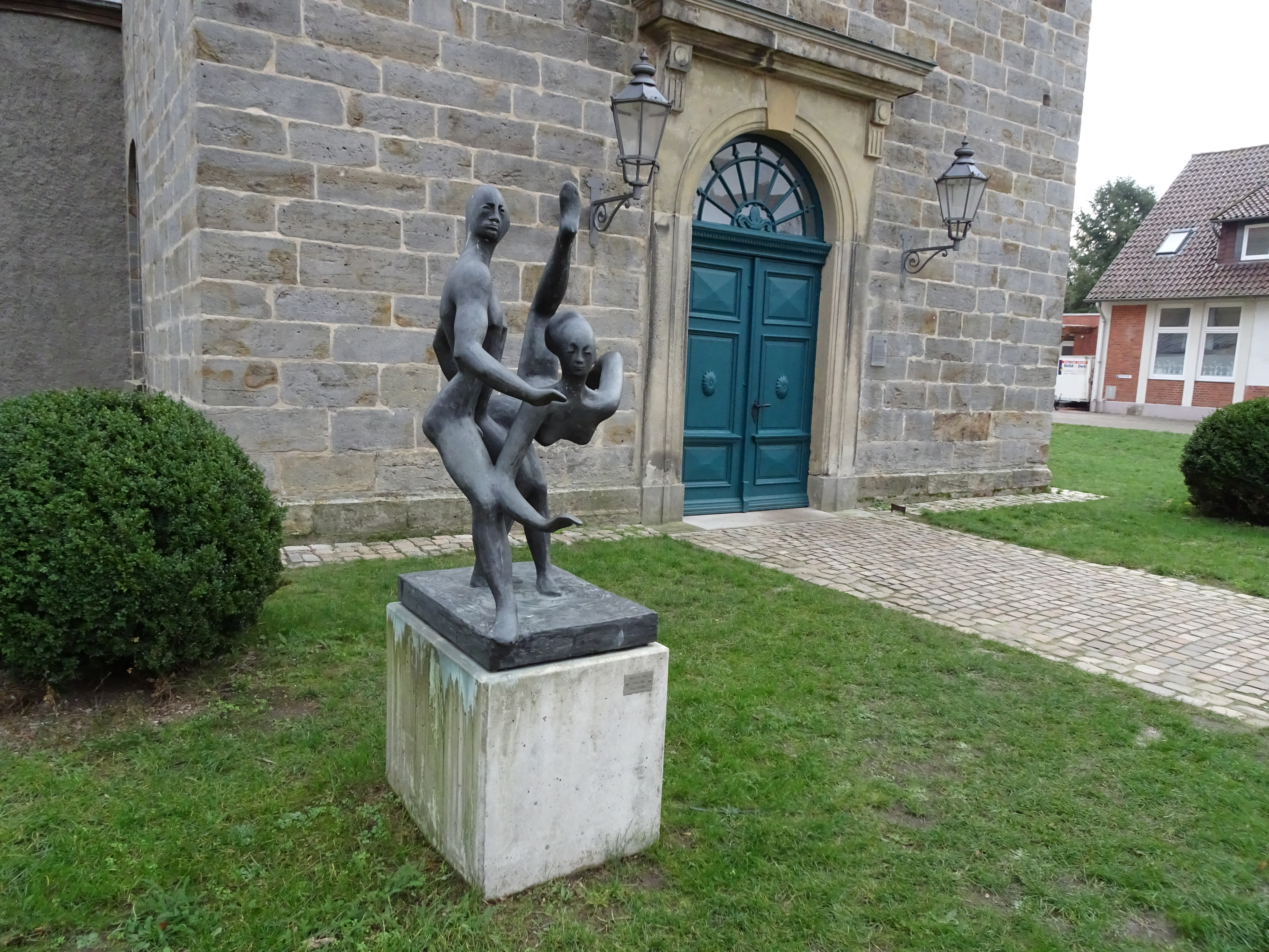 Bronzeskulptur "Paartanz" von Norbert Thoss vor dem Kulturzentrum Martinskirche in Hoya in Niedersachsen